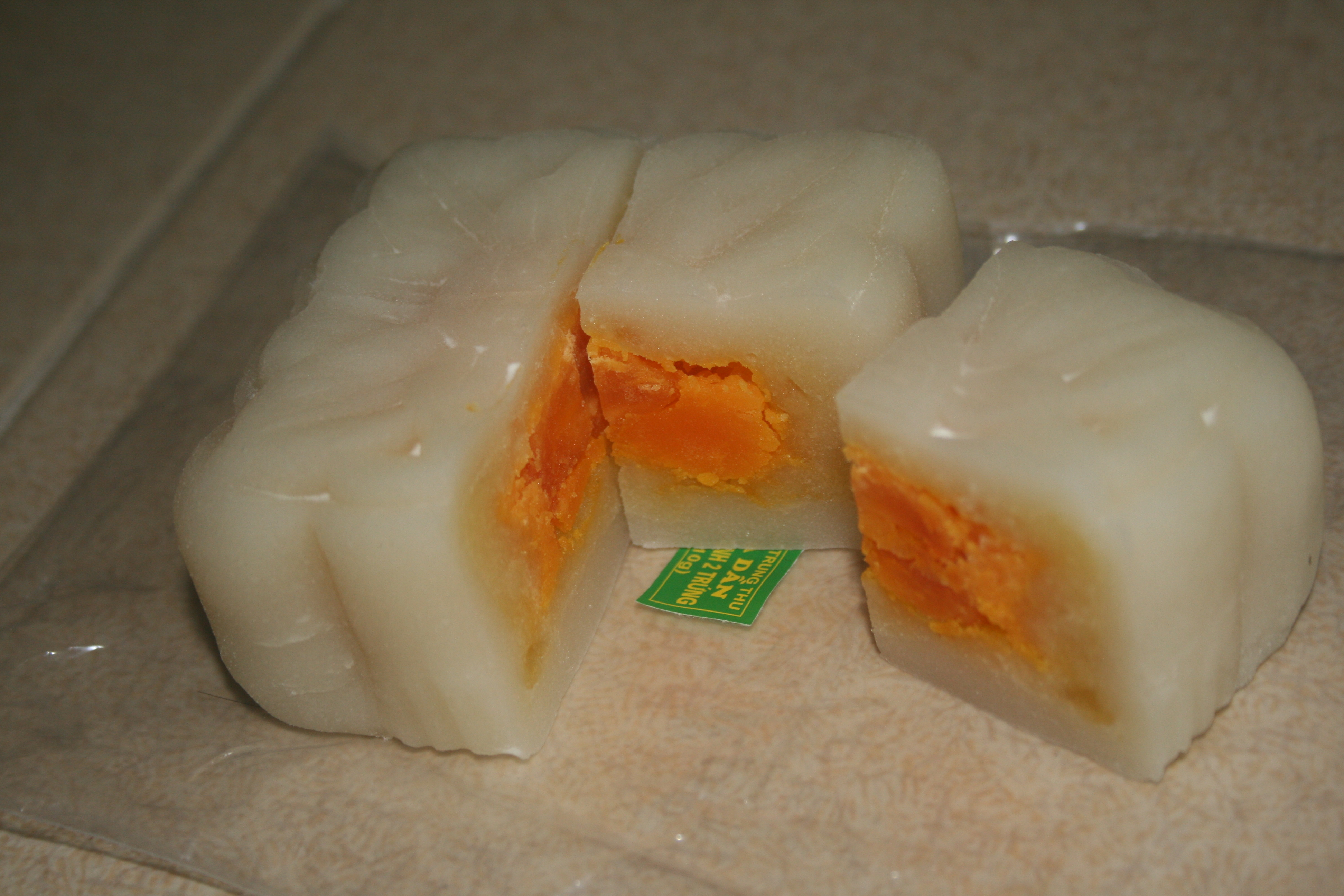 Bánh dẻo nhân đậu xanh 2 trứng mặn, sản phẩm của một cửa hàng bánh trung thu gia truyền tại Hà Nội, Việt Nam